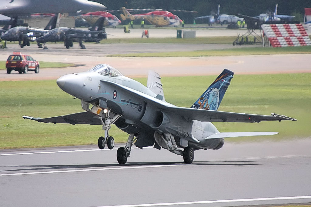 F18 - RIAT 2008